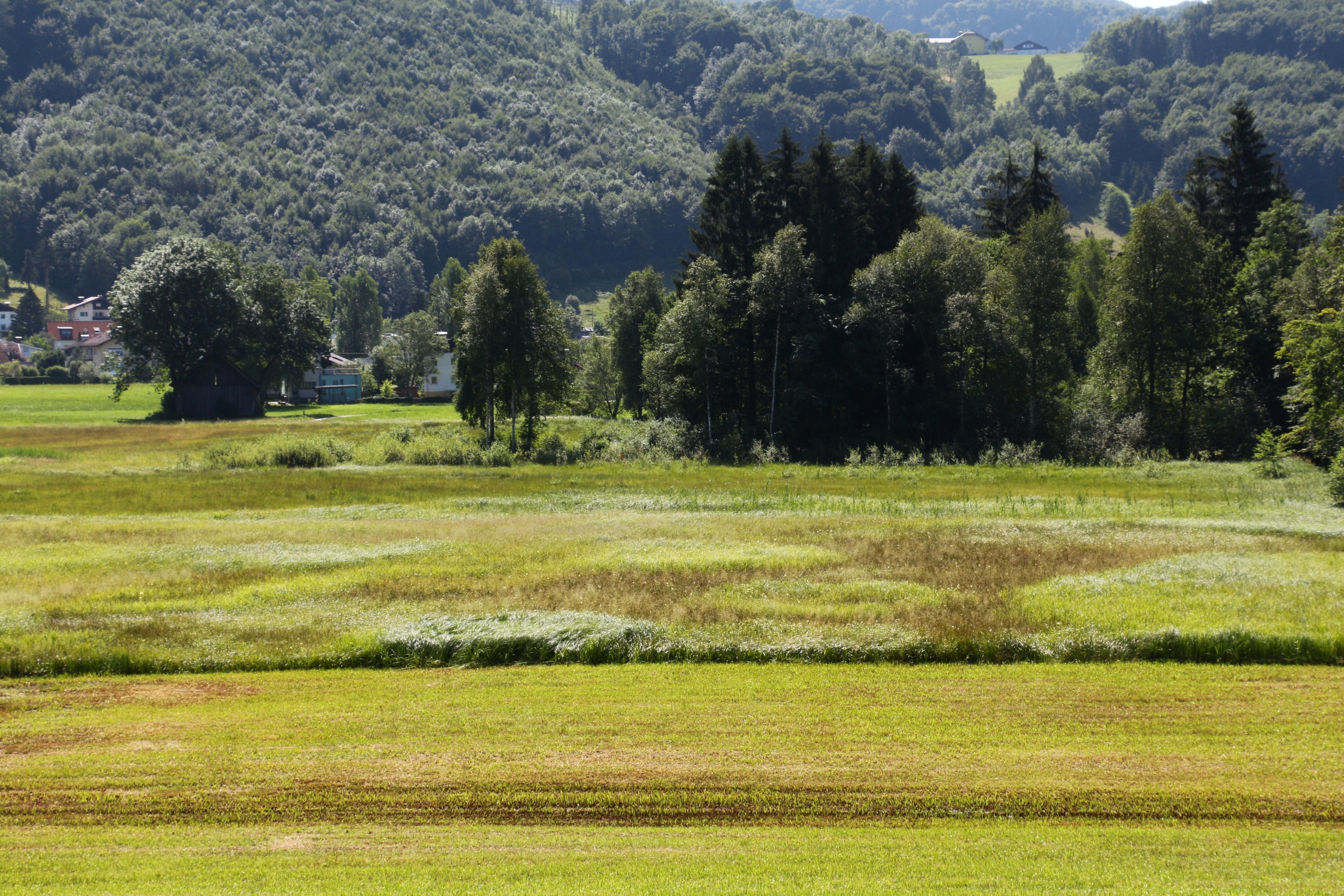 Das Samer Mösl mit Moorwäldchen in Sam im Salzburger Stadtteil Langwied